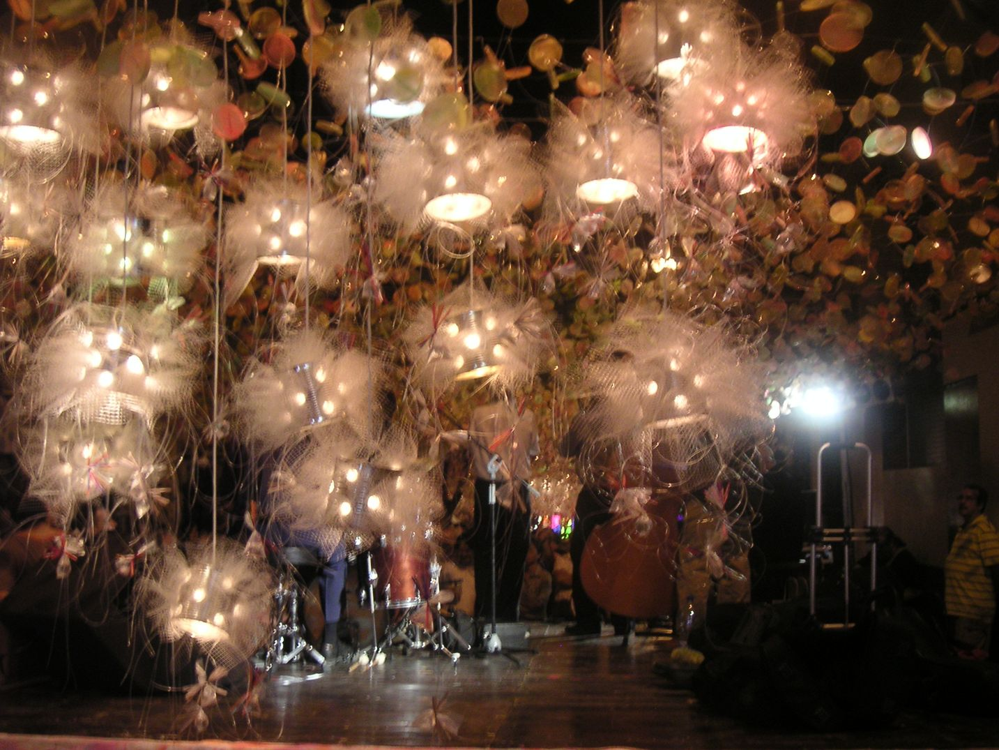 Detall de la decoració de les festes del barceloní barri de Gràcia l'any 2009.